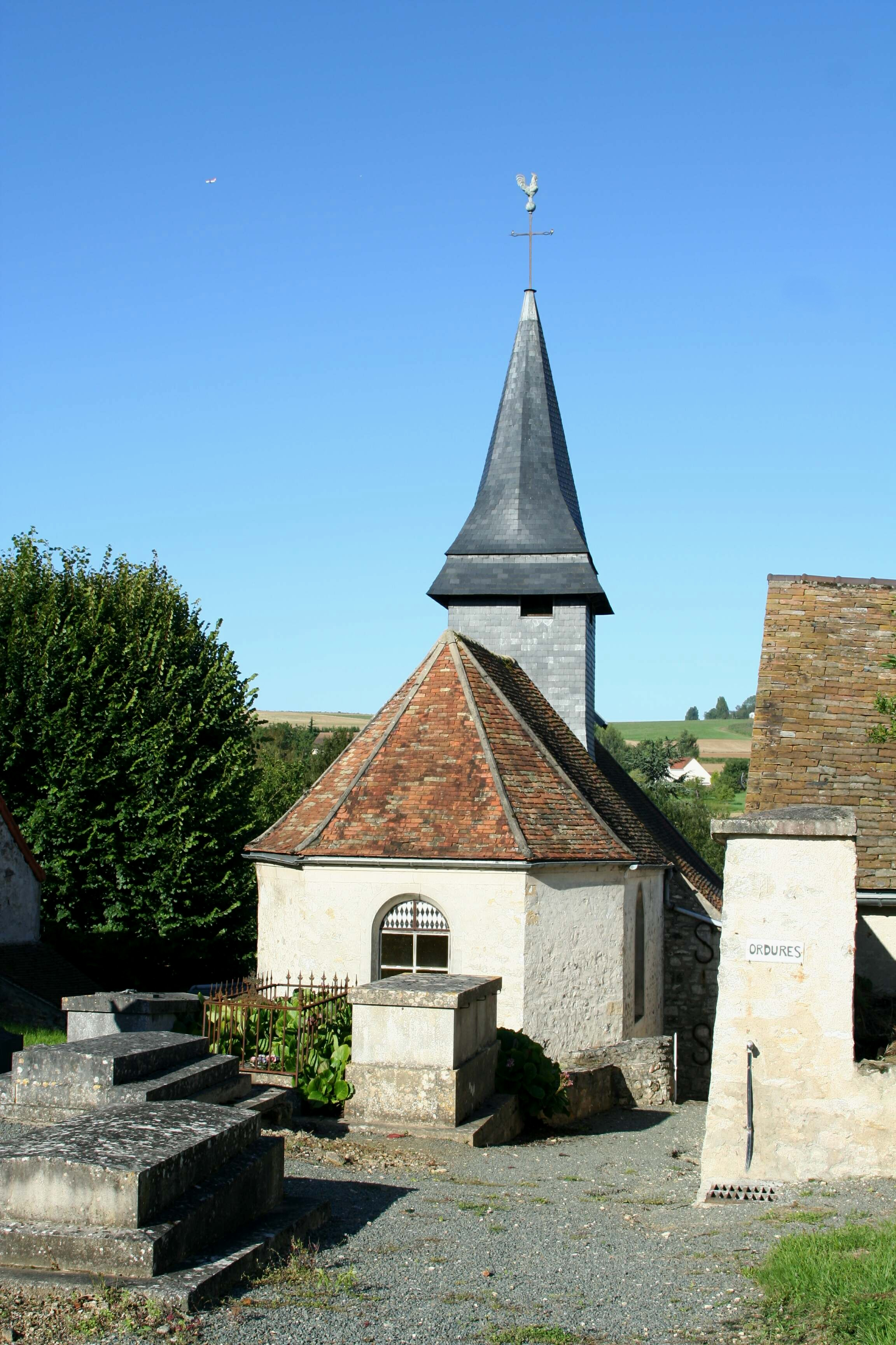 Église de Montalet-le-Bois - Yvelines (France)